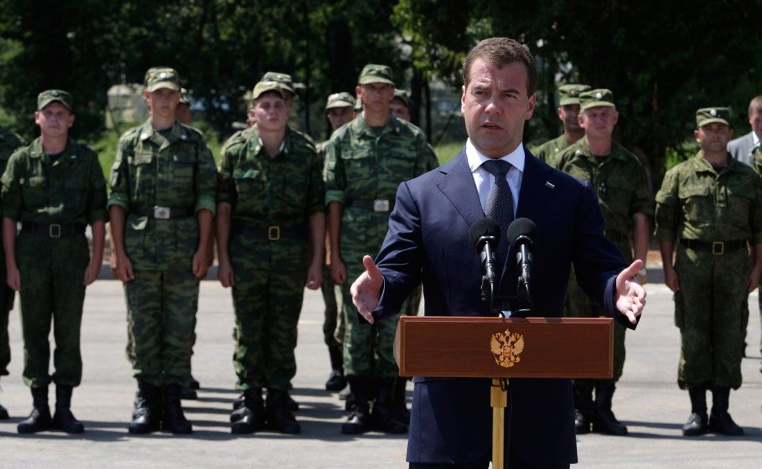 Посещение российской военной базы в Гудауте (Russian military base in Gudauta).